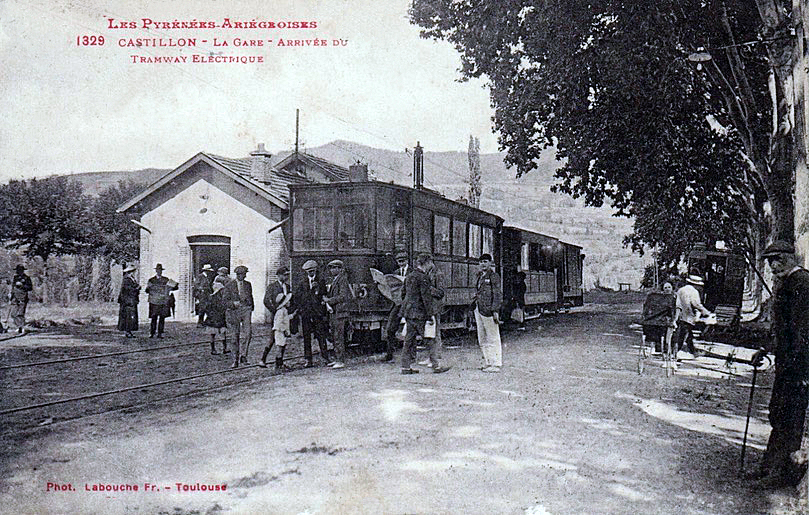 L'arrivée du tramway électrique, de la lLigne de Saint-Girons à Castillon et à Sentein, à la gare de Castillon-en-Couserans dans les Pyrénées-Ariégeoises